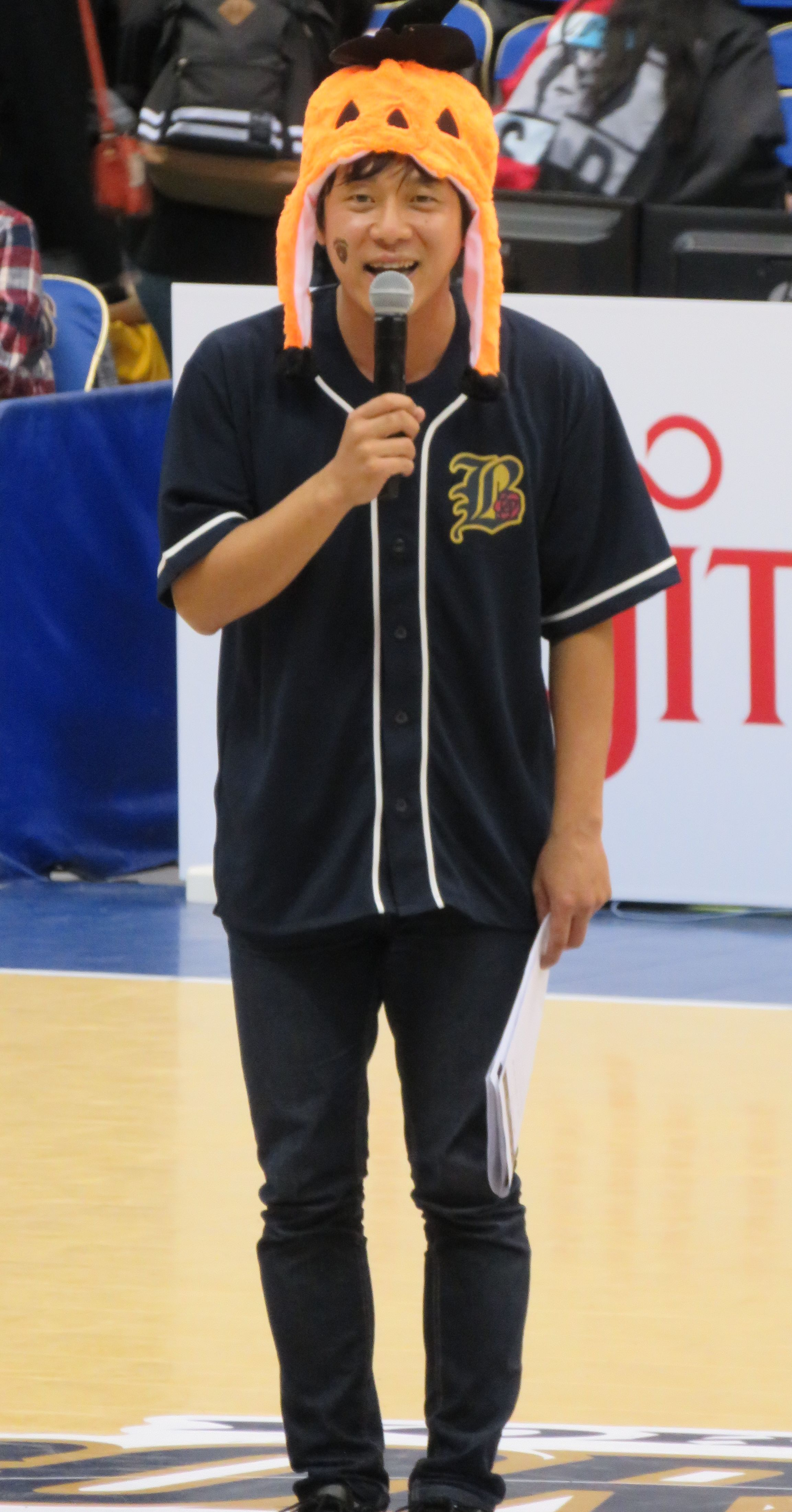 2018年10月24日撮影 横浜国際プールにて